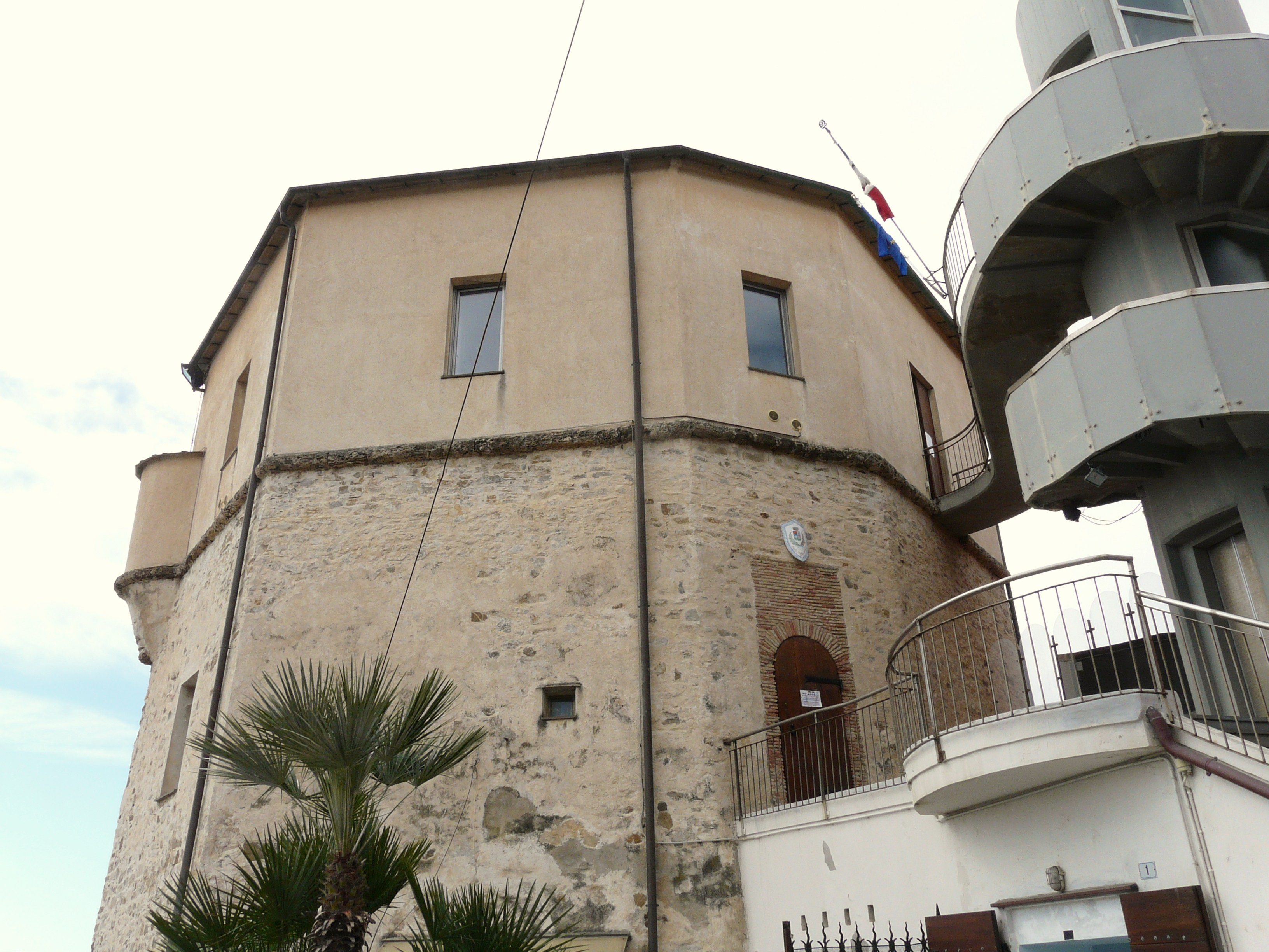 Municipio, Santo Stefano al Mare, Liguria, Italia